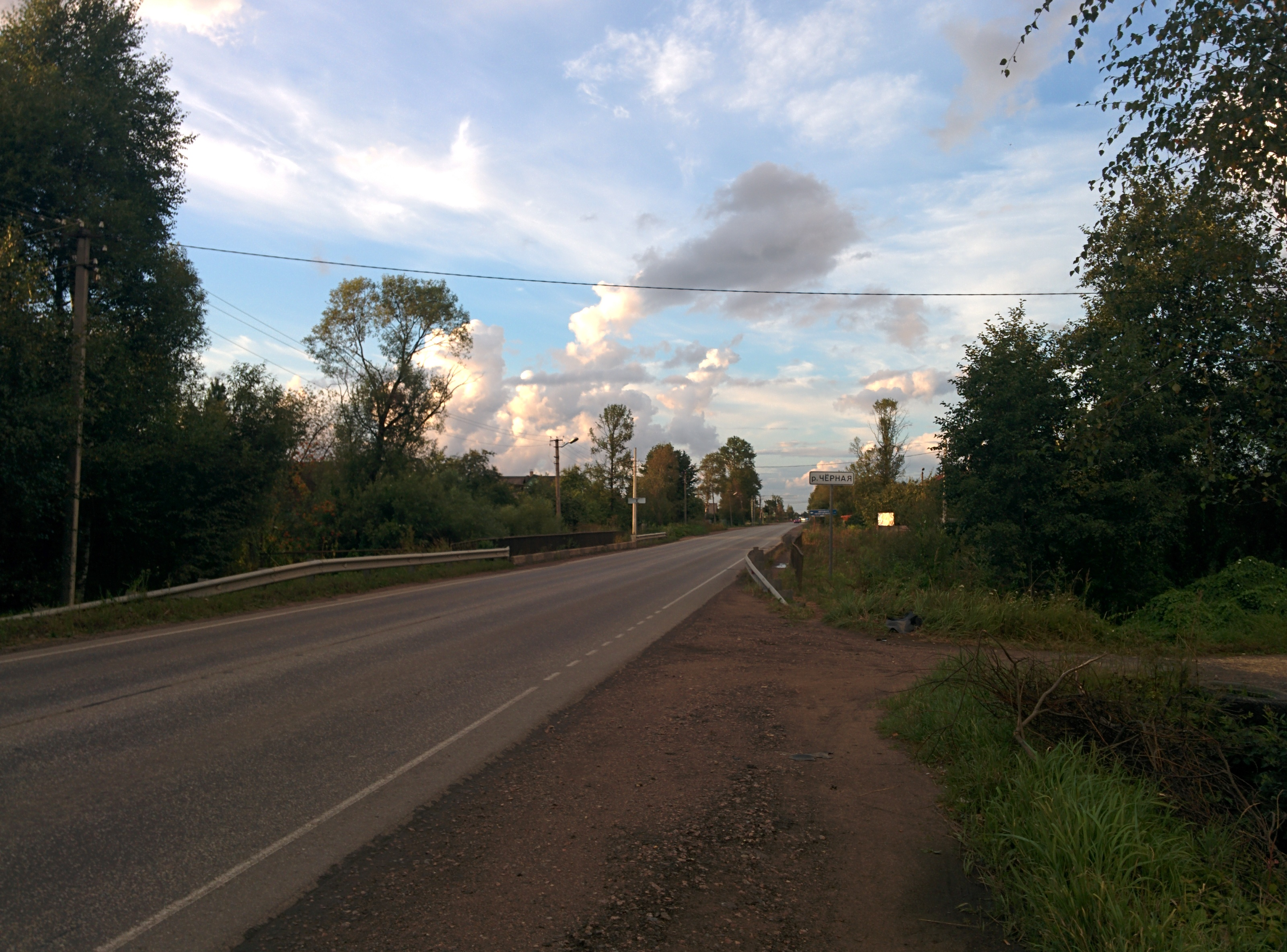 Река Черная